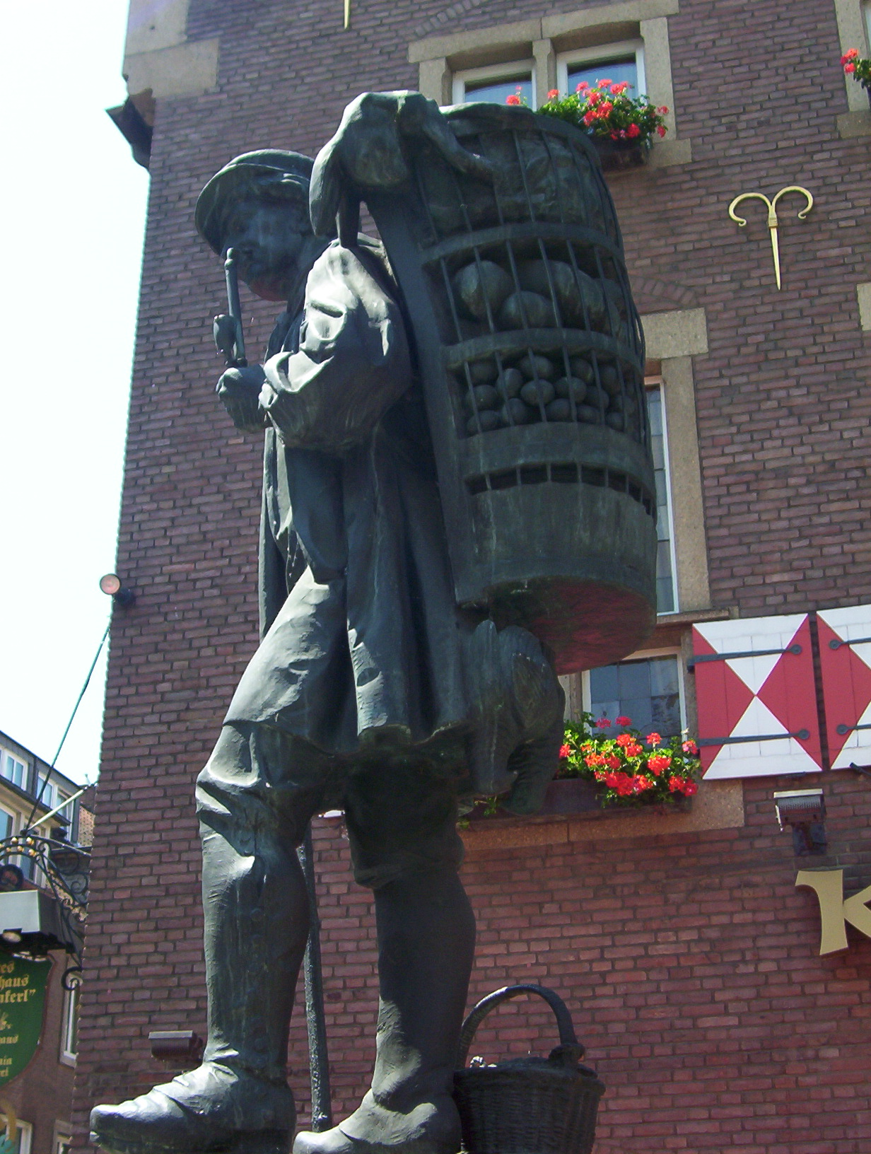 Foto des Kiepenkerl-Denkmals in Münster (Westfalen).